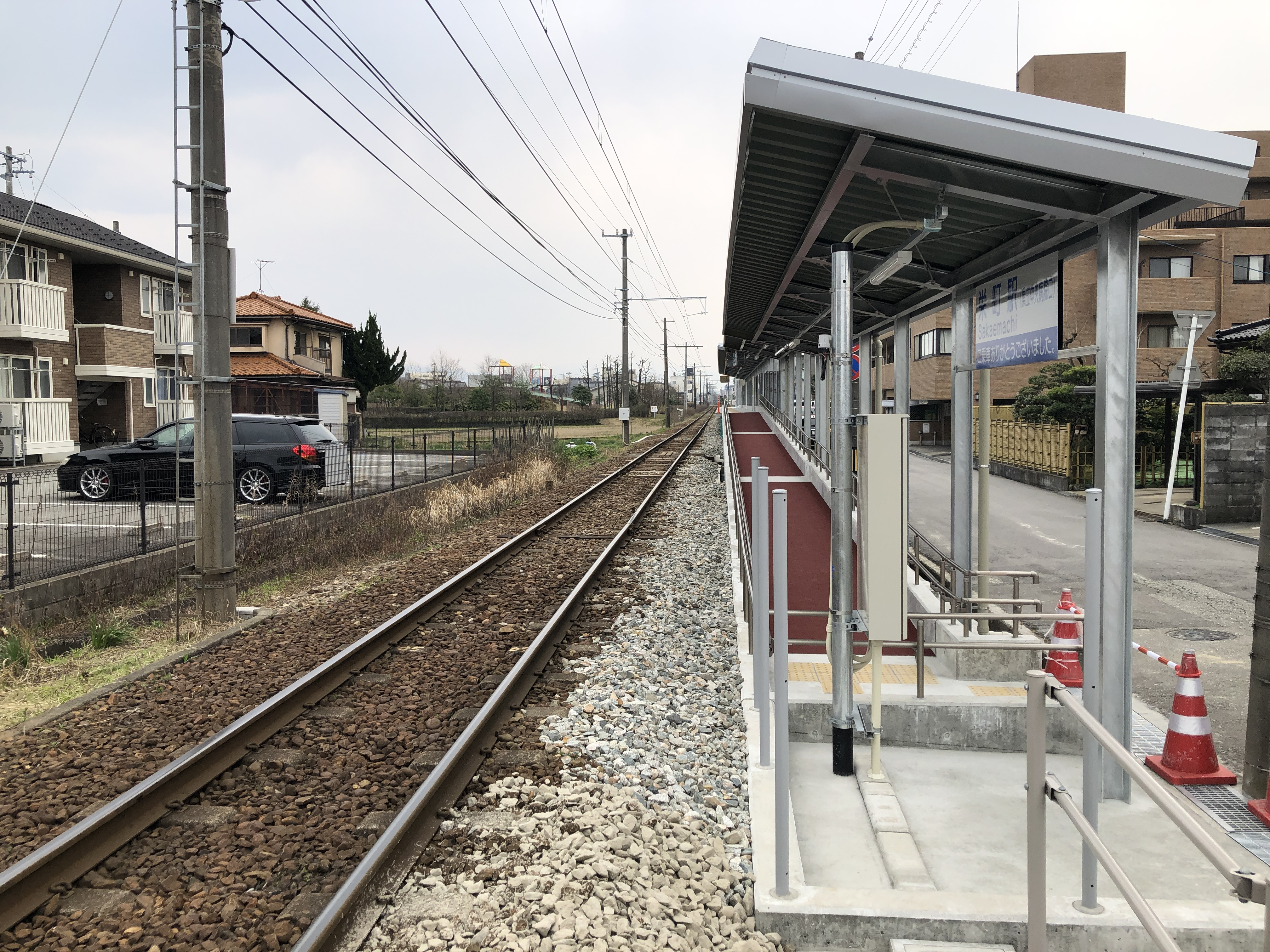 富山地方鉄道不二越線栄町駅